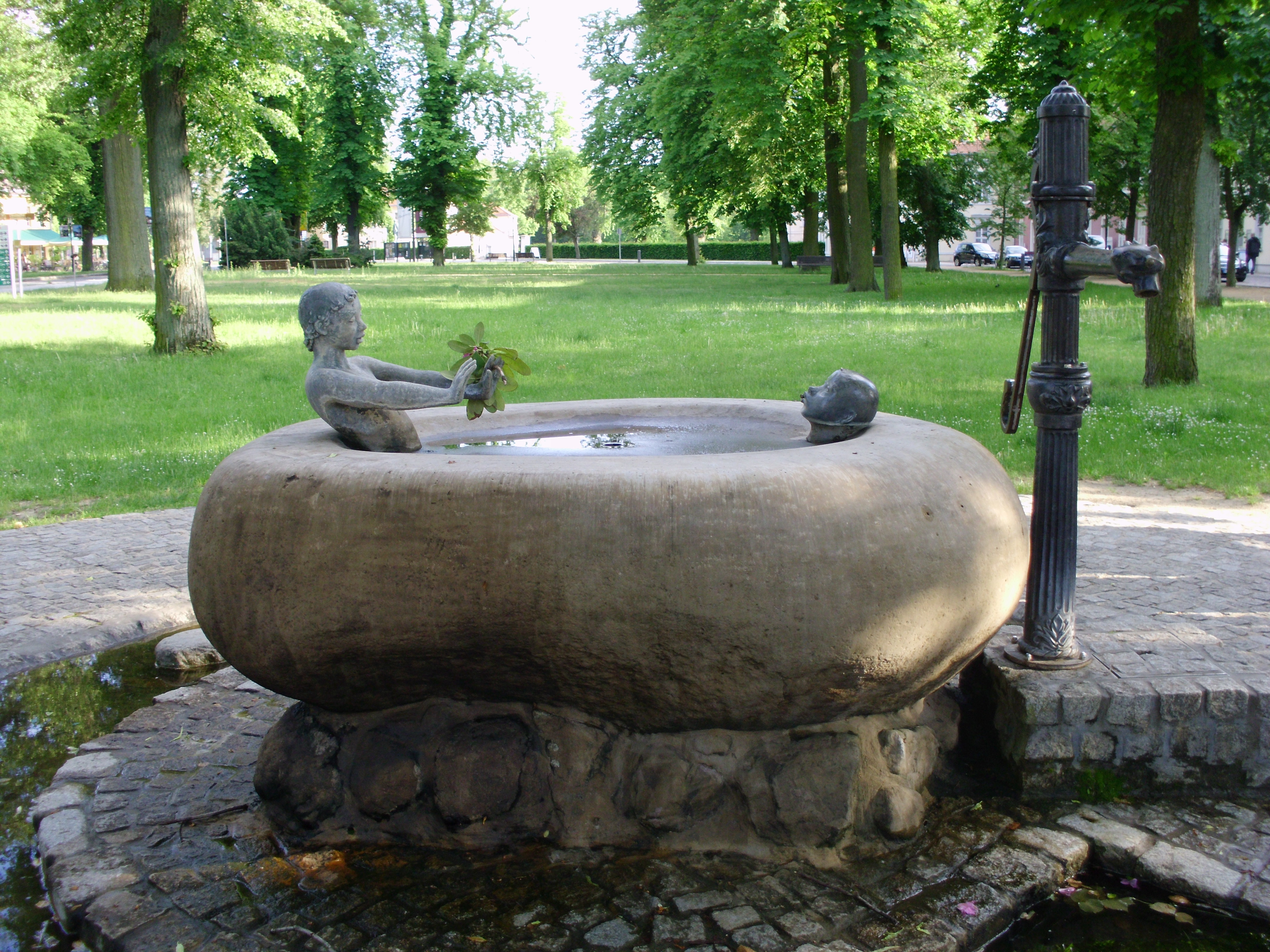 In den Jahren 2000-2001 wurde der Brunnen des Bildhauers Günter Kaden auf dem Marktplatz Rheinsberg, Brandenburg, Deutschland, errichtet.